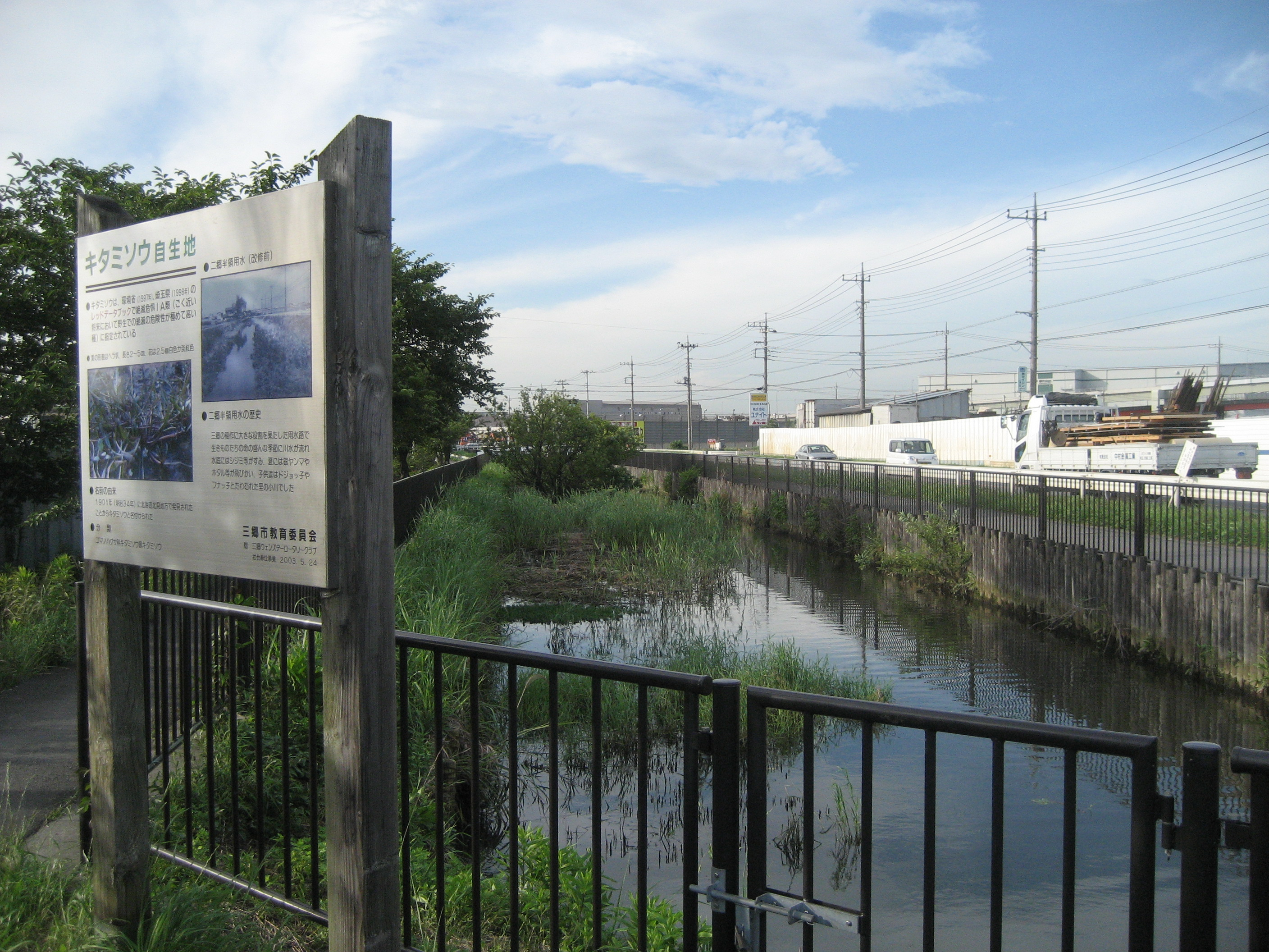 二郷半領用水路埼玉県三郷市キタミソウ自生地付近